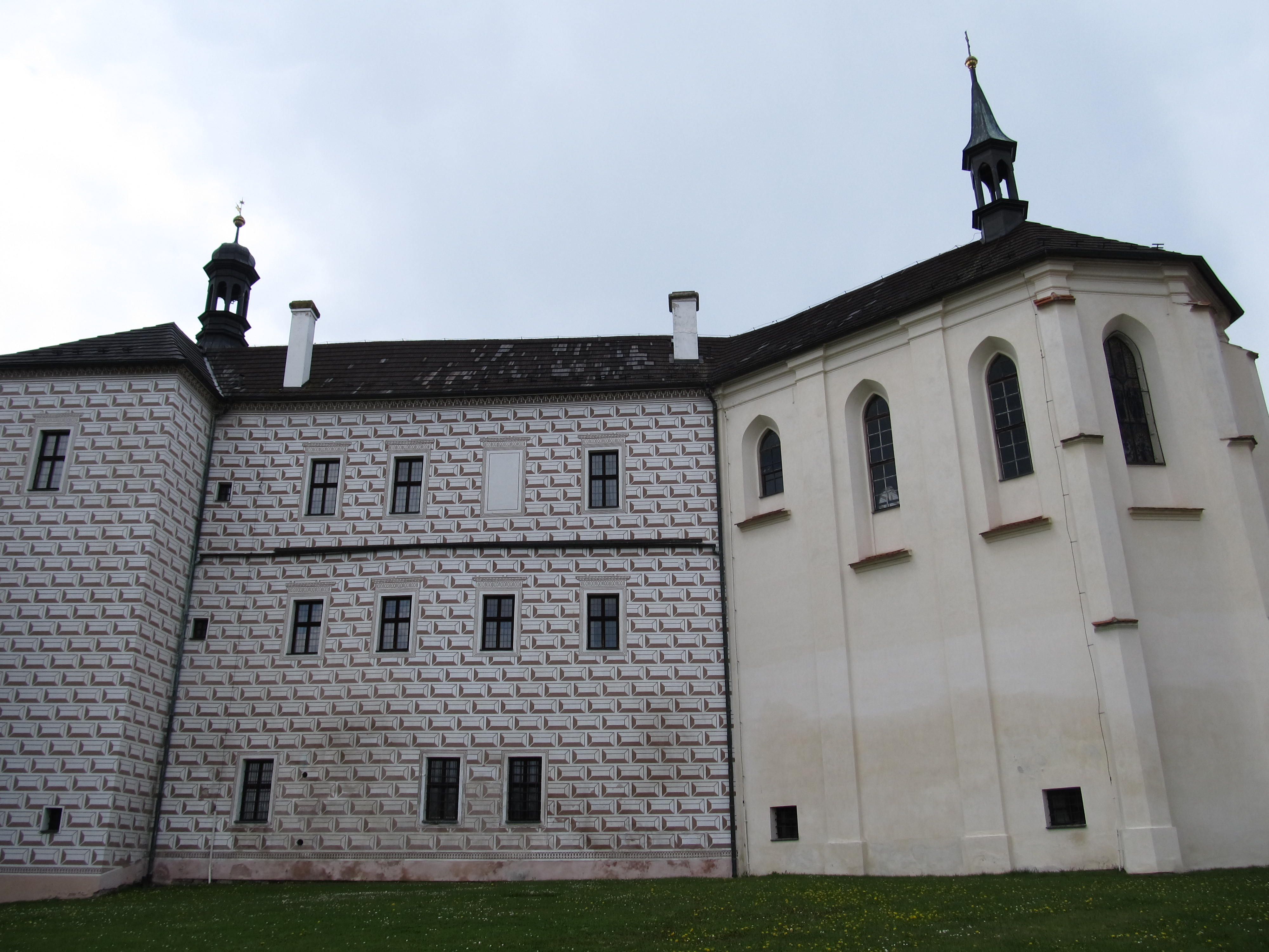 Zámecká kaple Neposkvrněného Početí Panny Marie